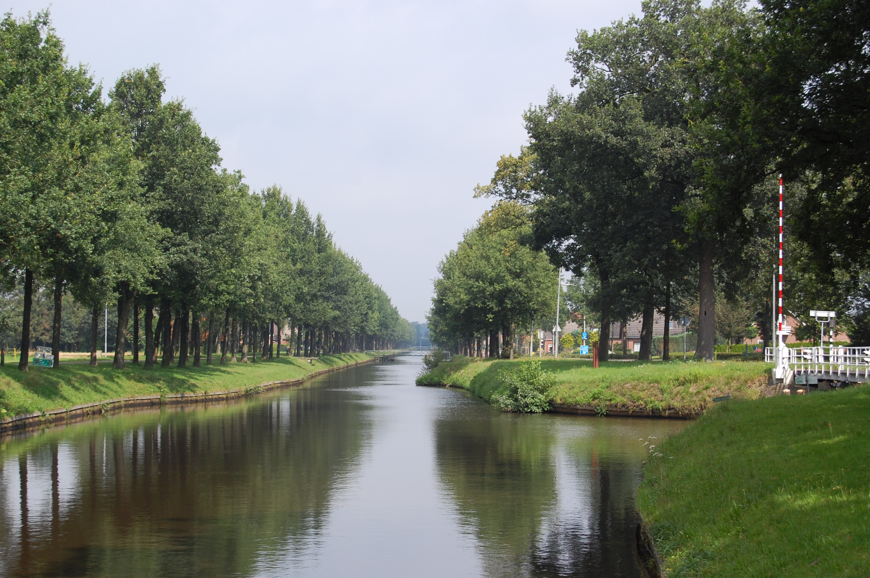 Kruising van het Ter-Apelkanaal en het Haren-Ruethenbrockkanal ter hoogte van Barnflair.